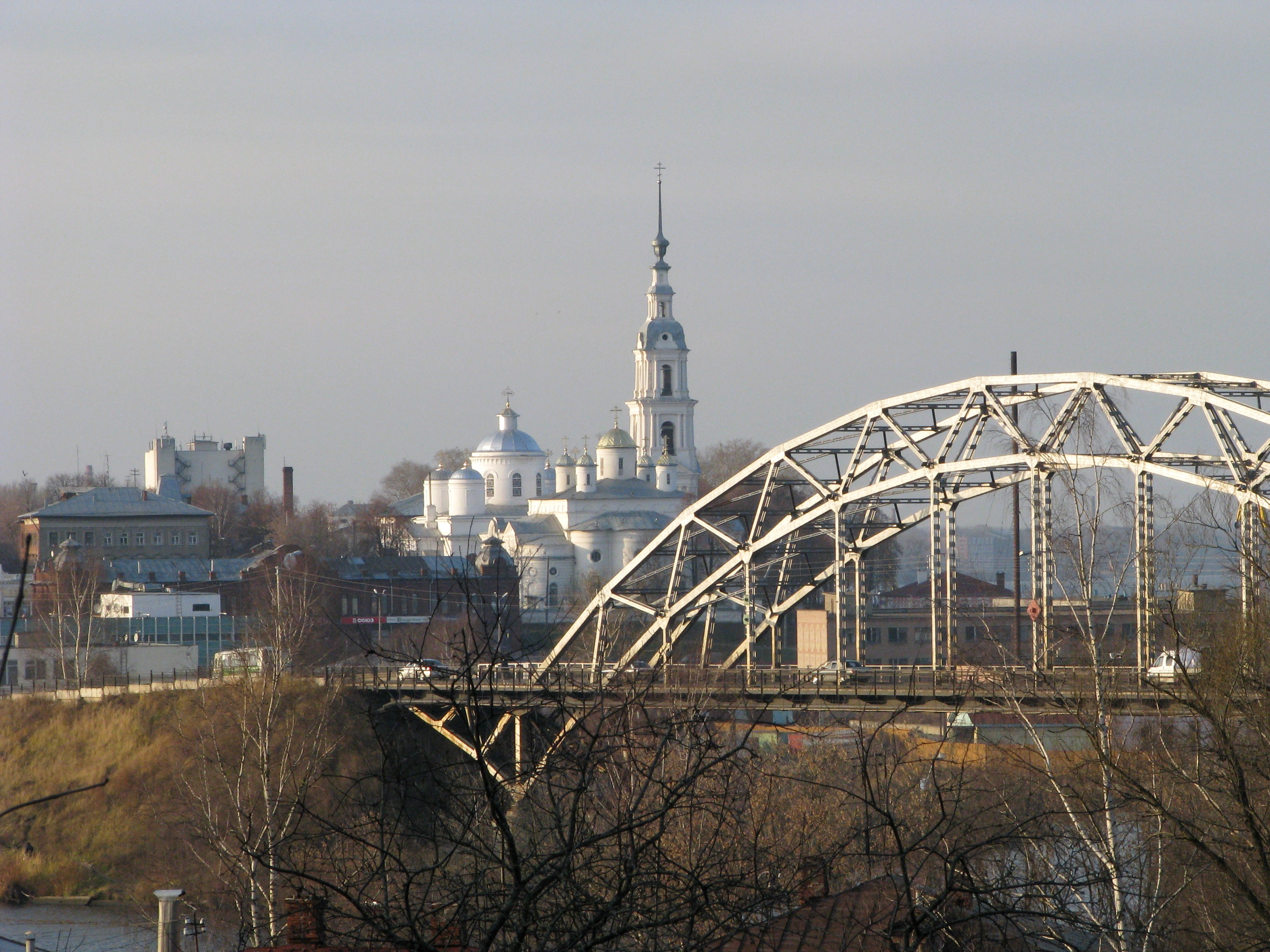 Никольский мост. Вид с Заречья